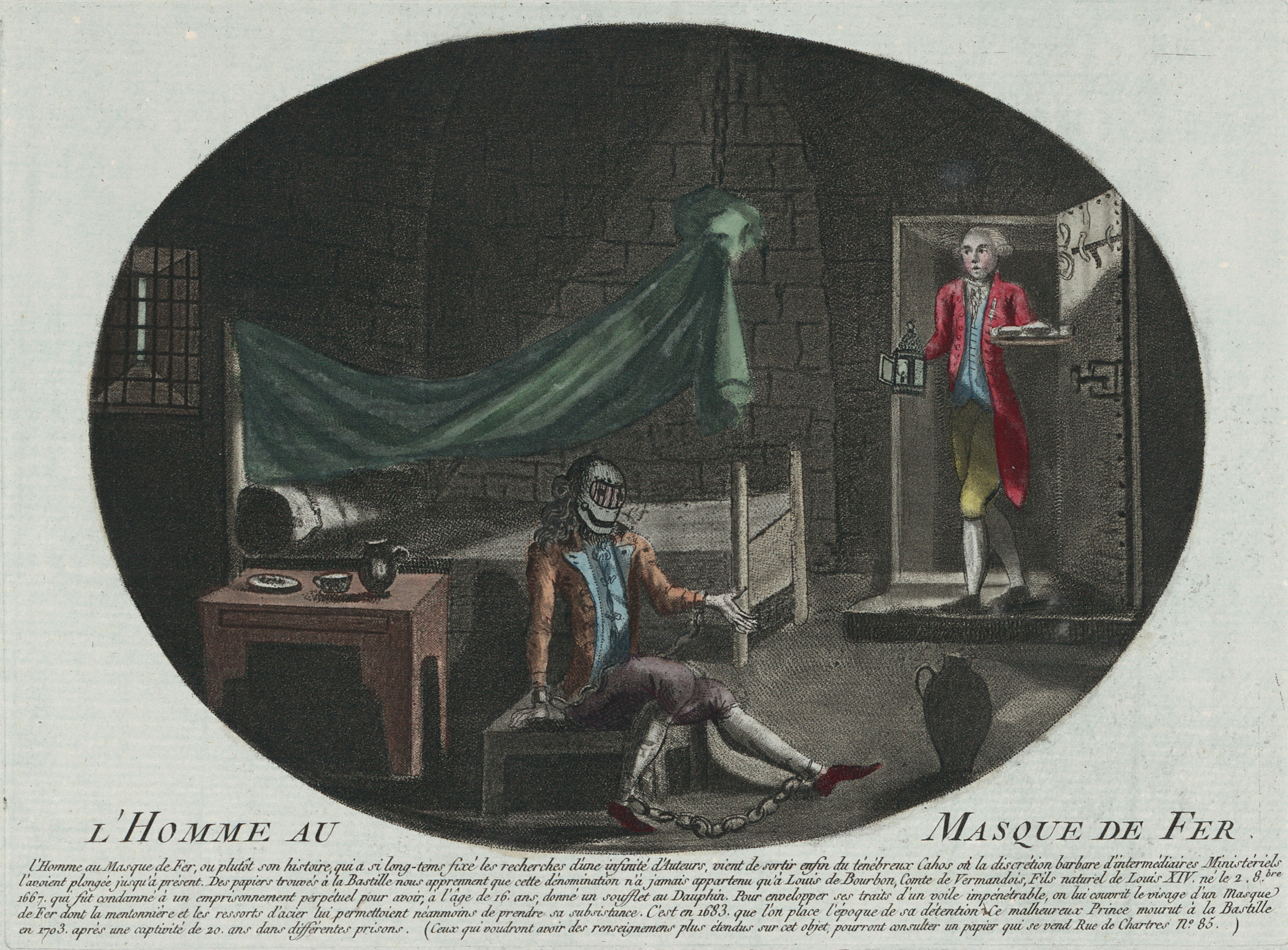 "L'Homme au Masque de Fer" ("The Man in the Iron Mask"). Anonymous print (etching and mezzotint, hand-colored) from 1789. According to the caption, the Man in the Iron Mask was Louis de Bourbon, comte de Vermandois, an illegitimate son of Louis XII. No evidence is given to support this claim, which is just one among many, and may have been merely a piece of revolutionary propaganda. Caption (in French, with modernized spelling): "L'Homme au Masque de Fer, ou plutôt son histoire, qui a si longtemps fixé les recherches d'une infinité d'auteurs, vient de sortir enfin du ténébreux chaos où la discrétion barbare d'intermédiaires ministériels l'avaient plongé jusqu'à présent. Des papiers trouvés à la Bastille nous apprennent que cette dénomination n'a jamais appartenu qu'à Louis de Bourbon, comte de Vermandois, fils naturel de Louis XIV, né le 2 octobre 1667, qui fut condamné à un emprisonnement perpétuel pour avoir, à l'âge de 16 ans, donné un soufflet au Dauphin. Pour envelopper ses traits d'un voile impénétrable, on lui couvrit le visage d'un masque de fer dont la mentonnière et les ressorts d'acier lui permettaient néanmoins de prendre sa subsistance. C'est en 1683 que l'on place l'époque de sa détention. Ce malheureux Prince mourut à la Bastille en 1703 après une captivité de 20 ans dans différentes prisons."